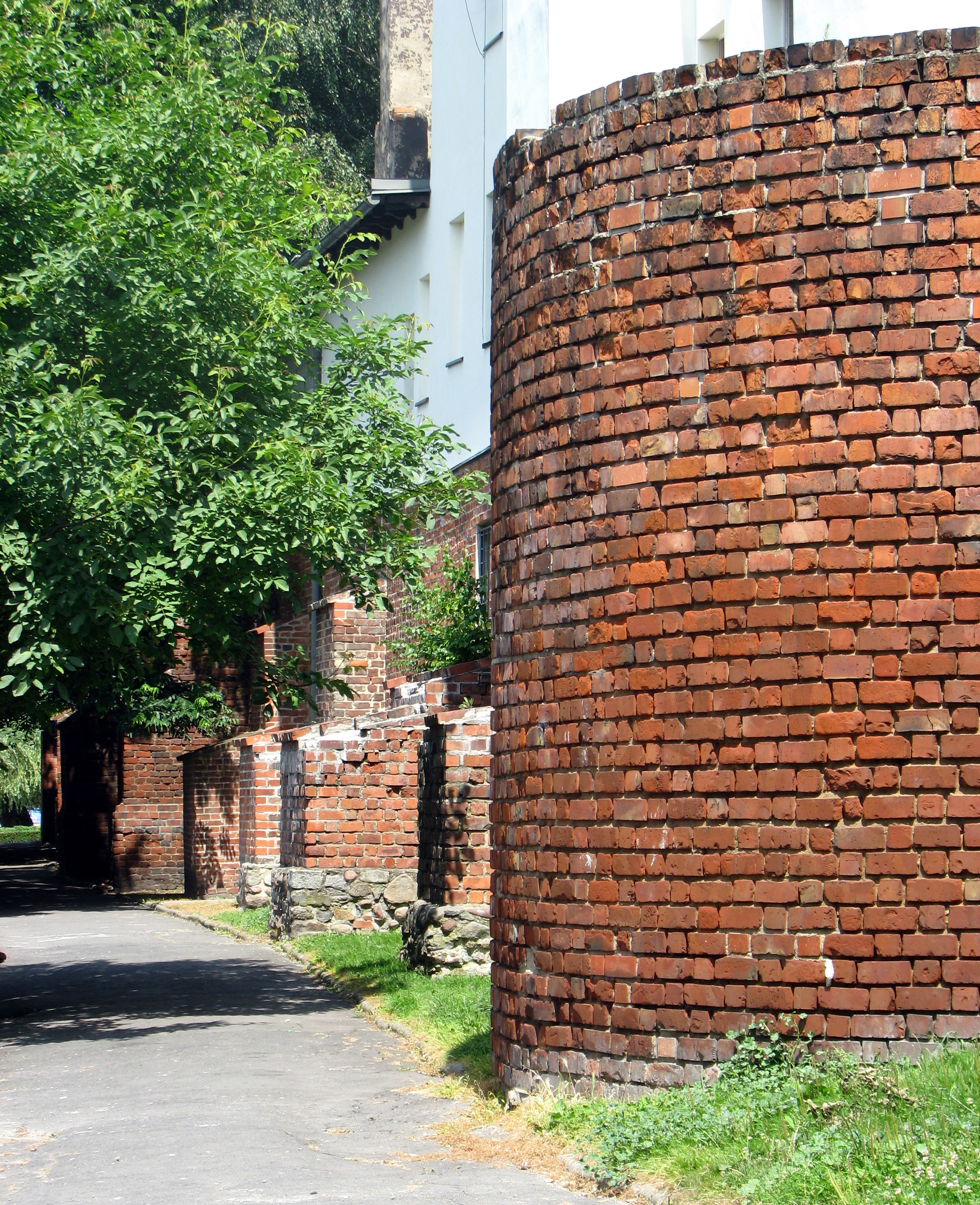 Oleśnica, mury obronne, 1 poł. XIV, 1 poł. XVI w. Widok z zewnątrz.